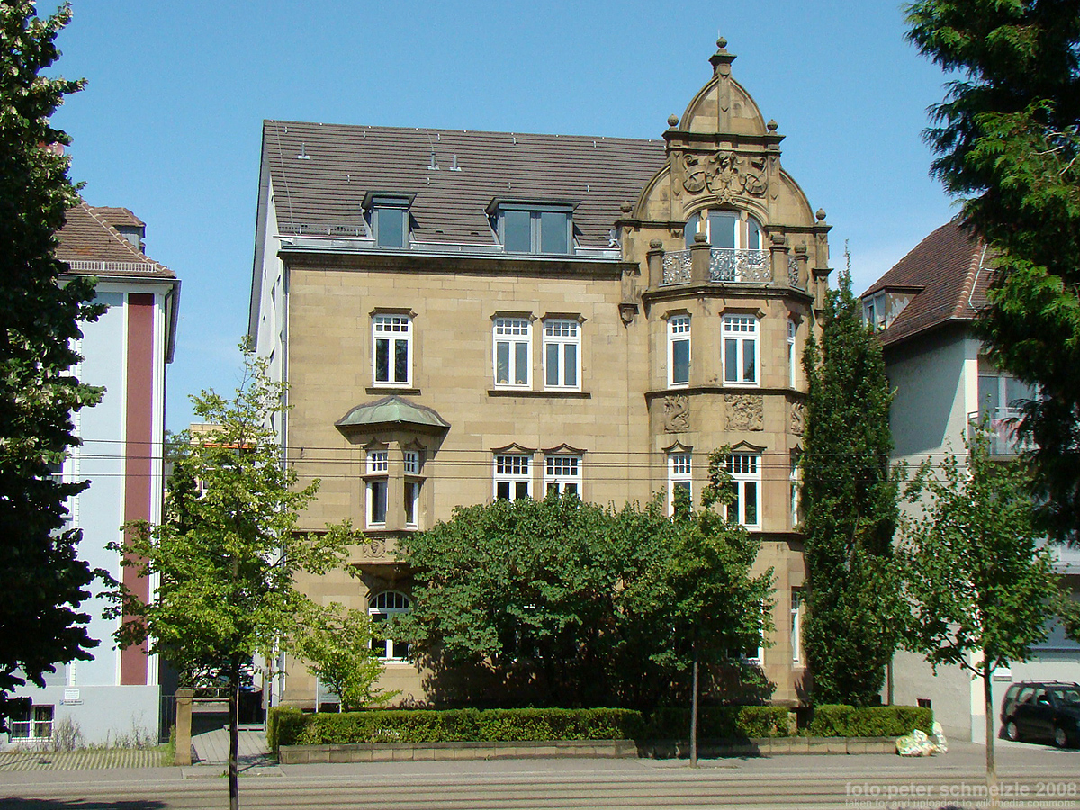 Denkmalgeschütztes Haus C.F.Hauth, Moltkestraße 35 in Heilbronn